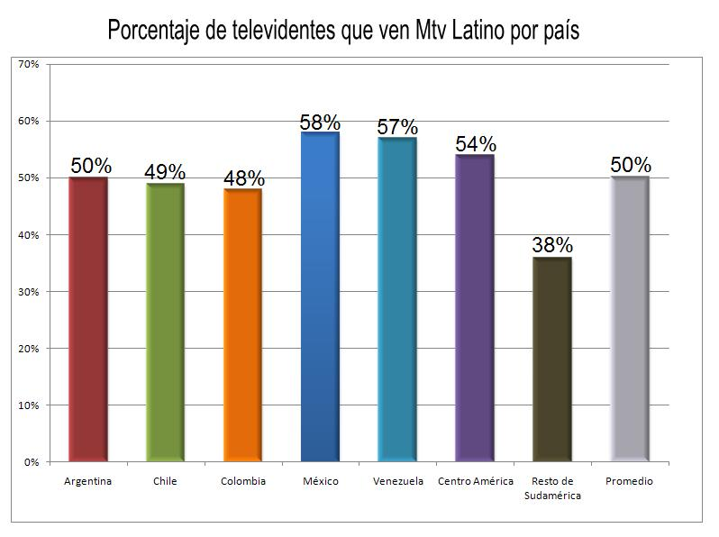 Porcentaje de televidentes que ven Mtv latino por país